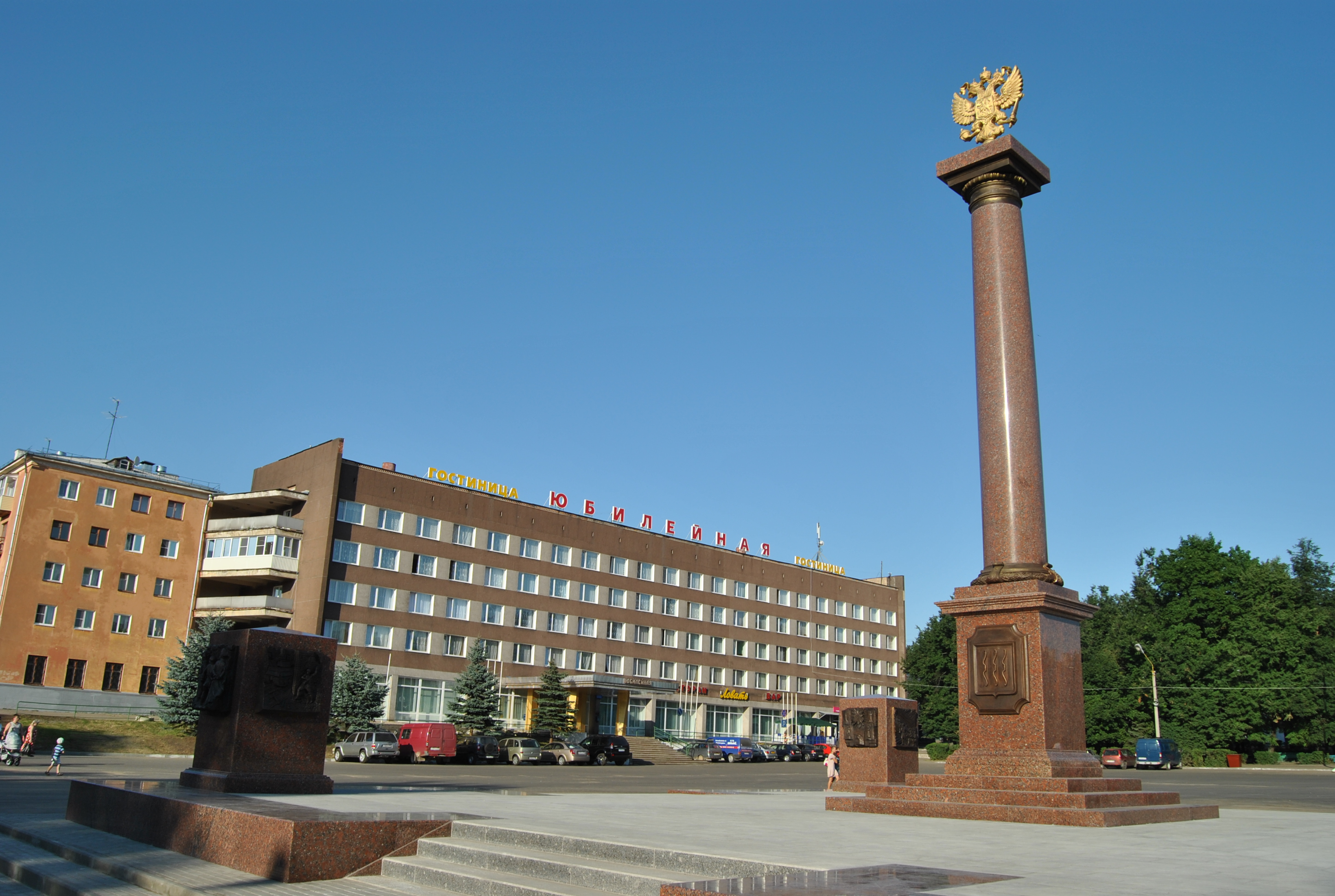 Гостиница Юбилейная, на центральной площади города Великие Луки.